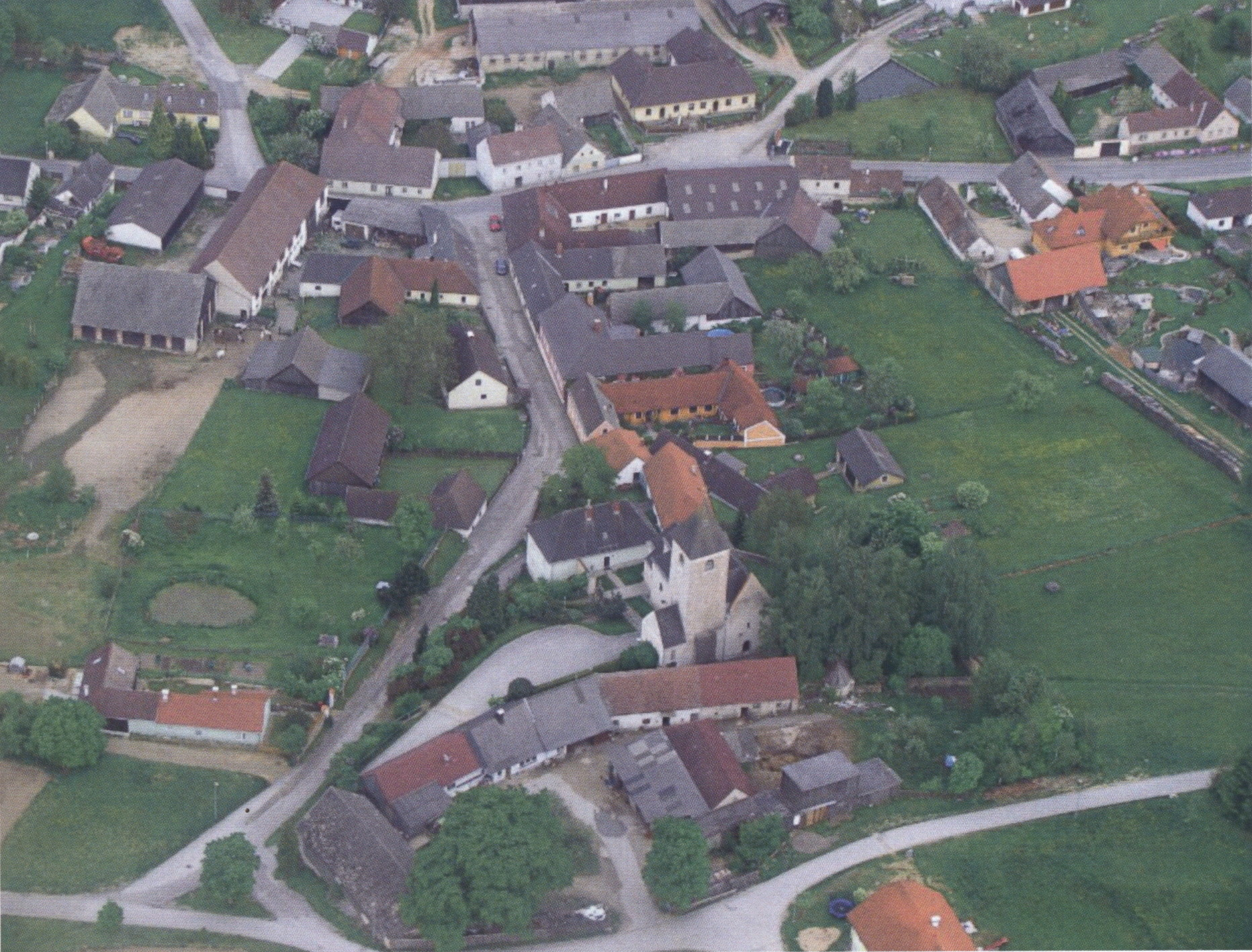 Puch bei Waidhofen an der Thaya.